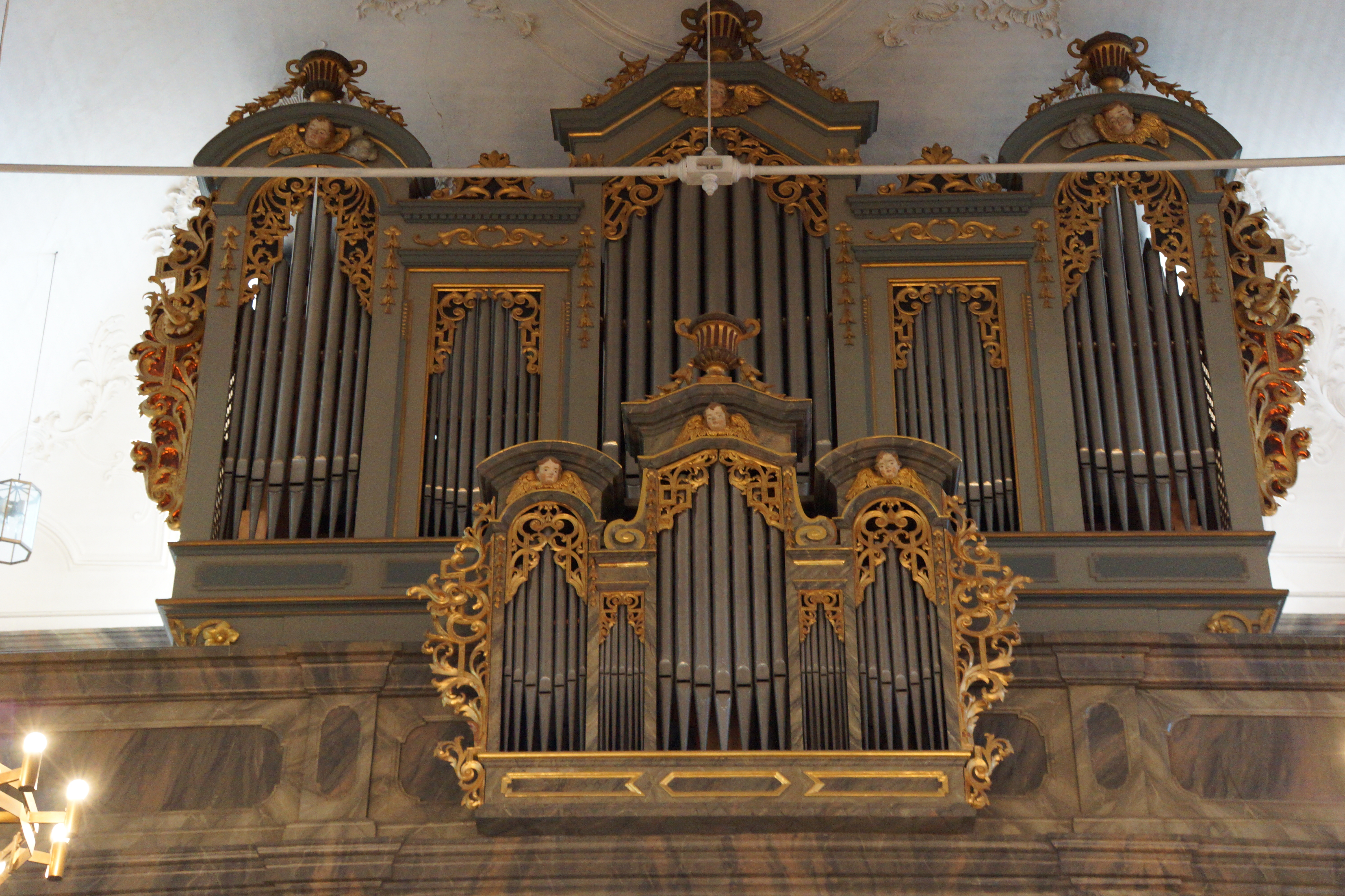 Die evangelische Pfarrkirche St. Laurentius in Altdorf bei Nürnberg